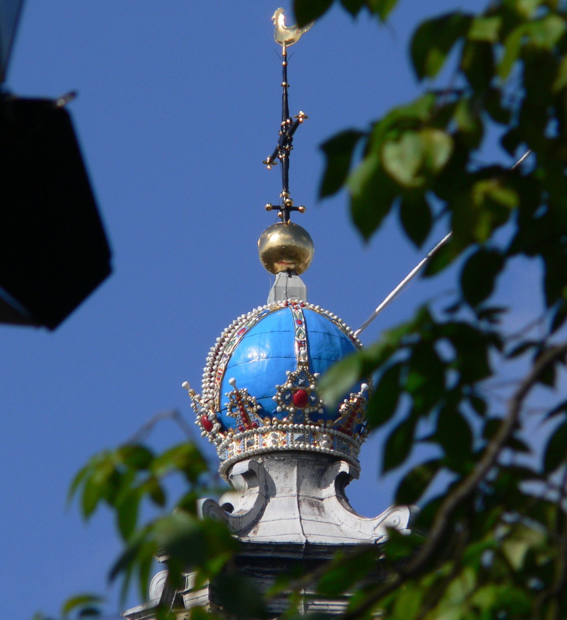 Keizerskroon Westertoren, huidig